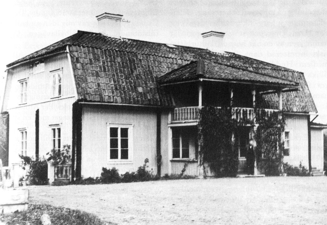 Glömsta gård i Huddinge, Sverige